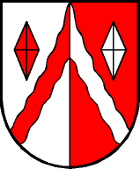 Gemeinde Eben im Pongau: In einem von Silber und Rot gespaltenen Schild ein farbverwechselter Wellensparren, oben rechts und links begleitet von einer farbverwechselten Facetten-Raute